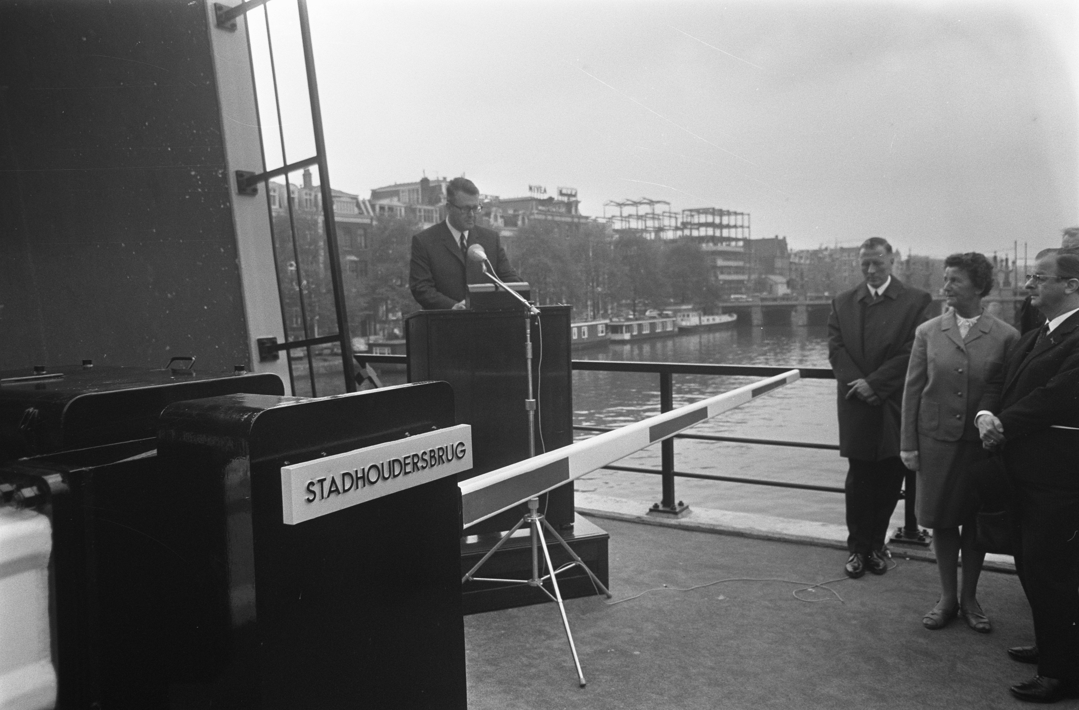 Collectie / Archief : Fotocollectie Anefo Reportage / Serie : [ onbekend ] Beschrijving : opening stadhoudersbrug Datum : 23 oktober 1969 Locatie : Amsterdam, Noord-Holland Trefwoorden : openingen Persoonsnaam : Wit, R.J. de Fotograaf : Verhoeff, Bert / Anefo Auteursrechthebbende : Nationaal Archief Materiaalsoort : Negatief (zwart/wit) Nummer archiefinventaris : bekijk toegang 2.24.01.05 Bestanddeelnummer : 922-8992 Reacties Geplaatst door Maaike op 21 mei 2014 - 21:44. Op 2 oktober 1974 is de naam van de brug gewijzigd in Torontobrug. NB. Toronto is de 'zusterstad' van Amsterdam